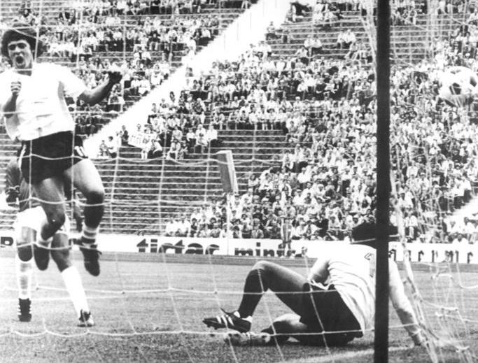 ADN-ZB-AP-Tele-23.6.74-ma-BRD-München: X. Fußball-Weltmeisterschaft-1. Finalrunde, Gruppe 4: Argentinien-Haiti 4:1- Rene Orlando Houseman (Argentinien-links) erzielte in der 17. Minute das 2:0. Torwart Henry Francillon (Haiti-am Boden) hat das Nachsehen.